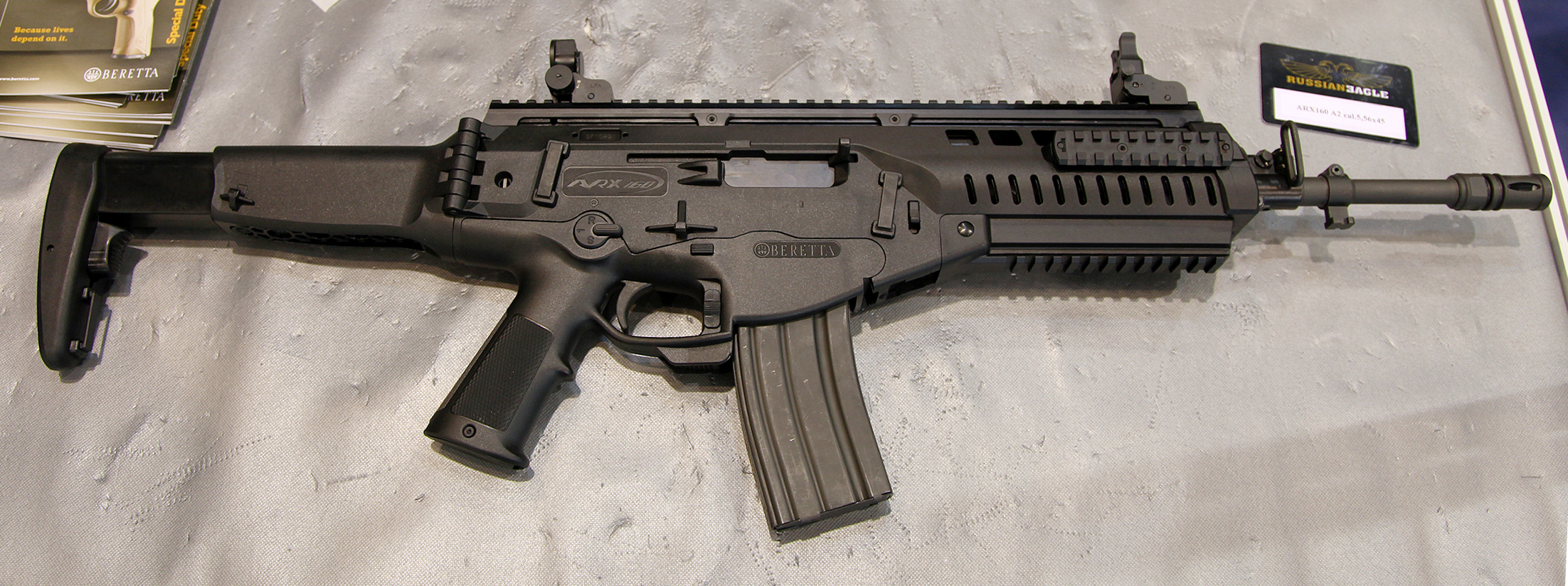 5.56x45 Beretta ARX-160 A3